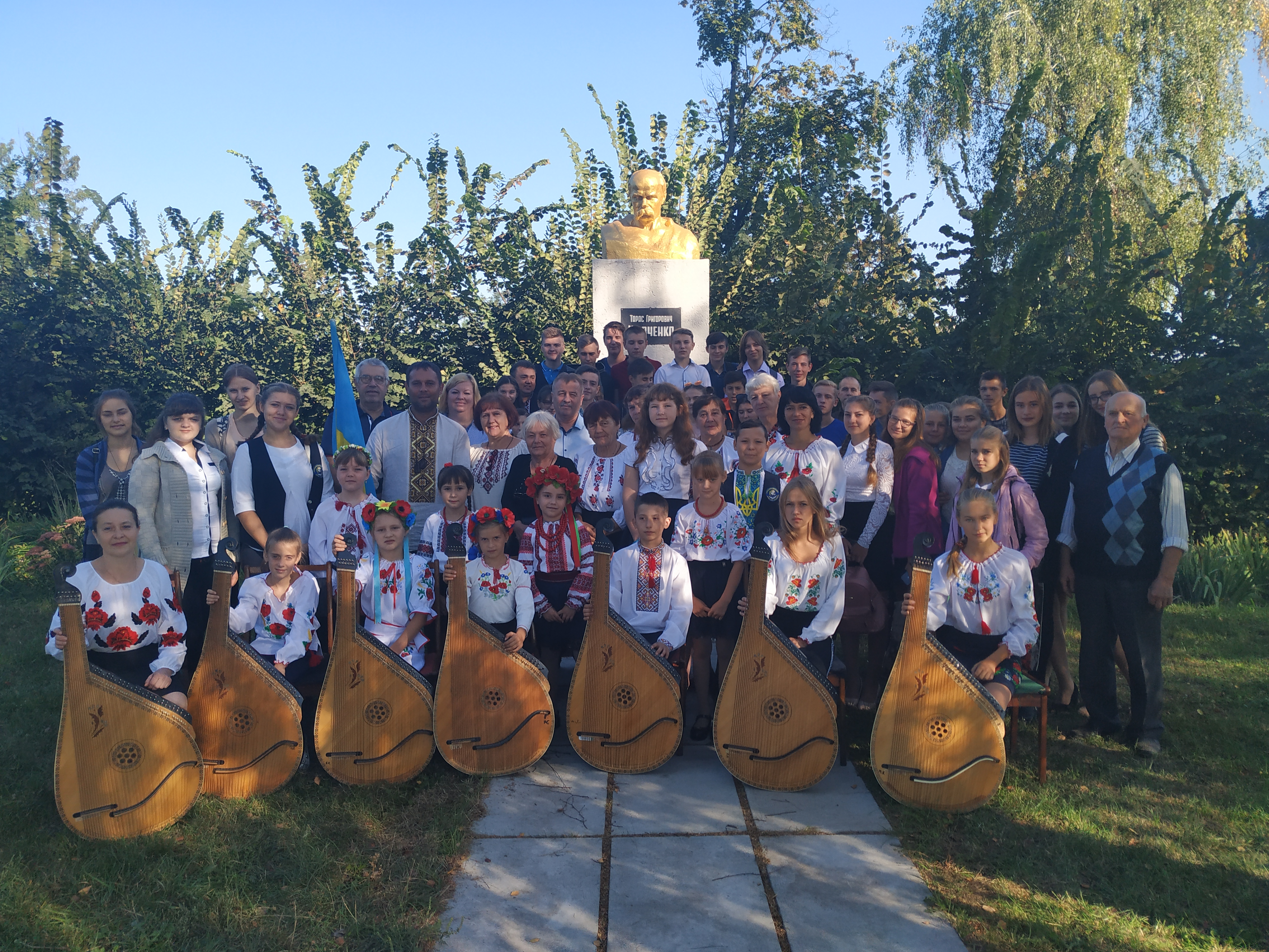 ТД 2-10 с.Гельмязів